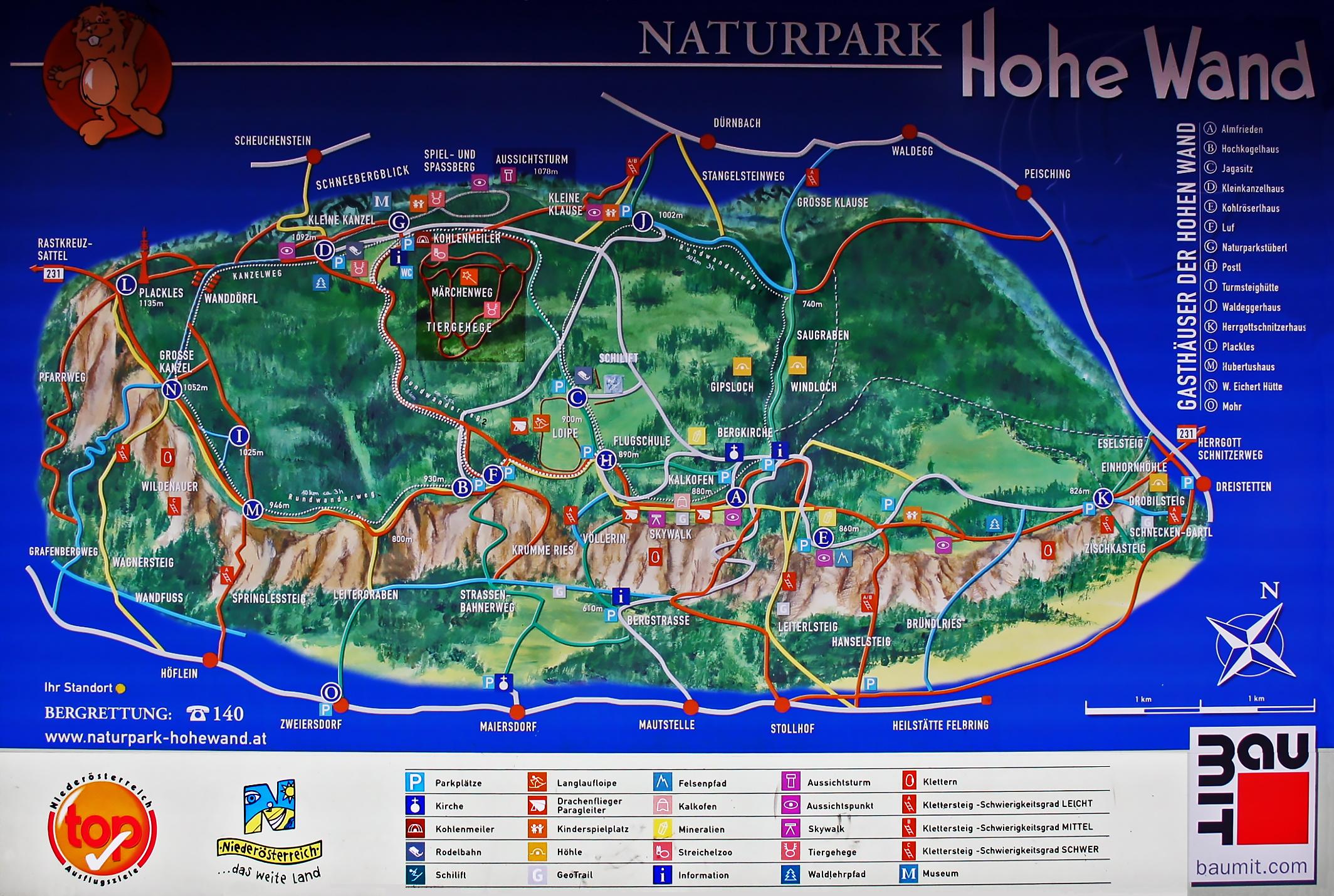 Übersichtskarte (Gasthäuser) des niederösterreichischen Naturparks Hohe Wand.